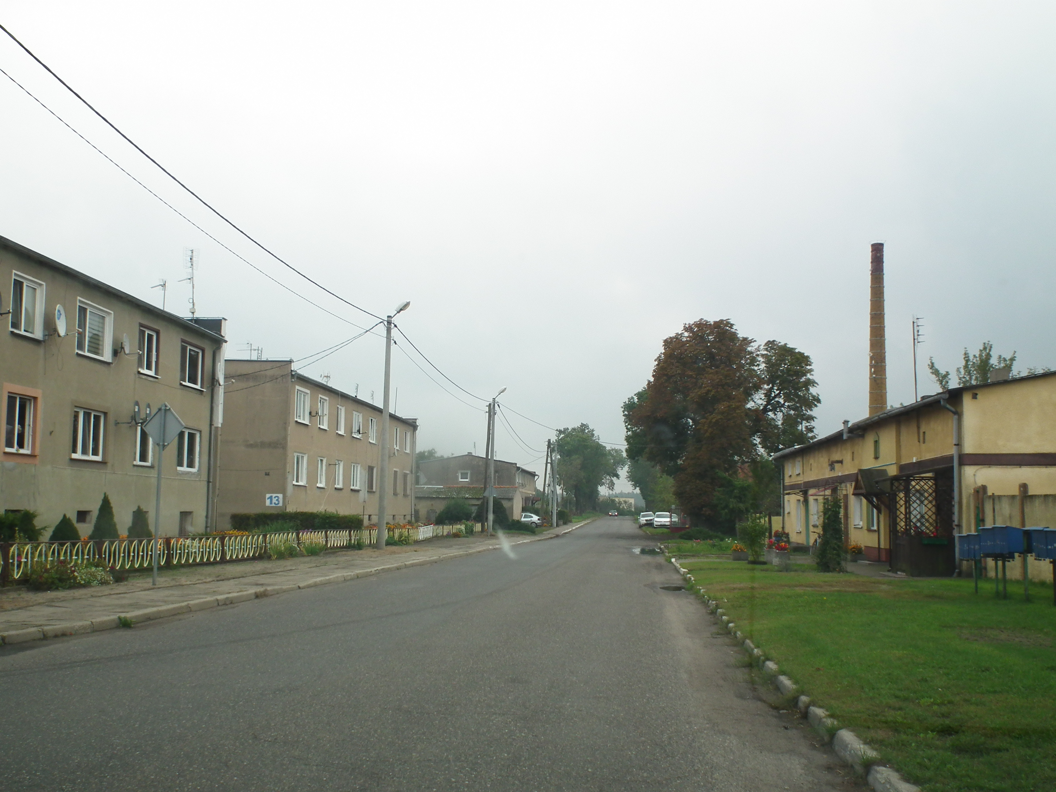 Mielno, gm. Mieleszyn.